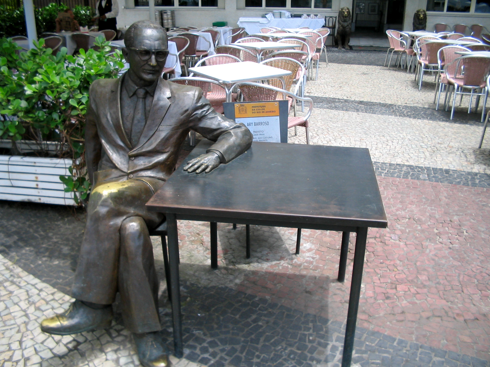 Ary Barroso